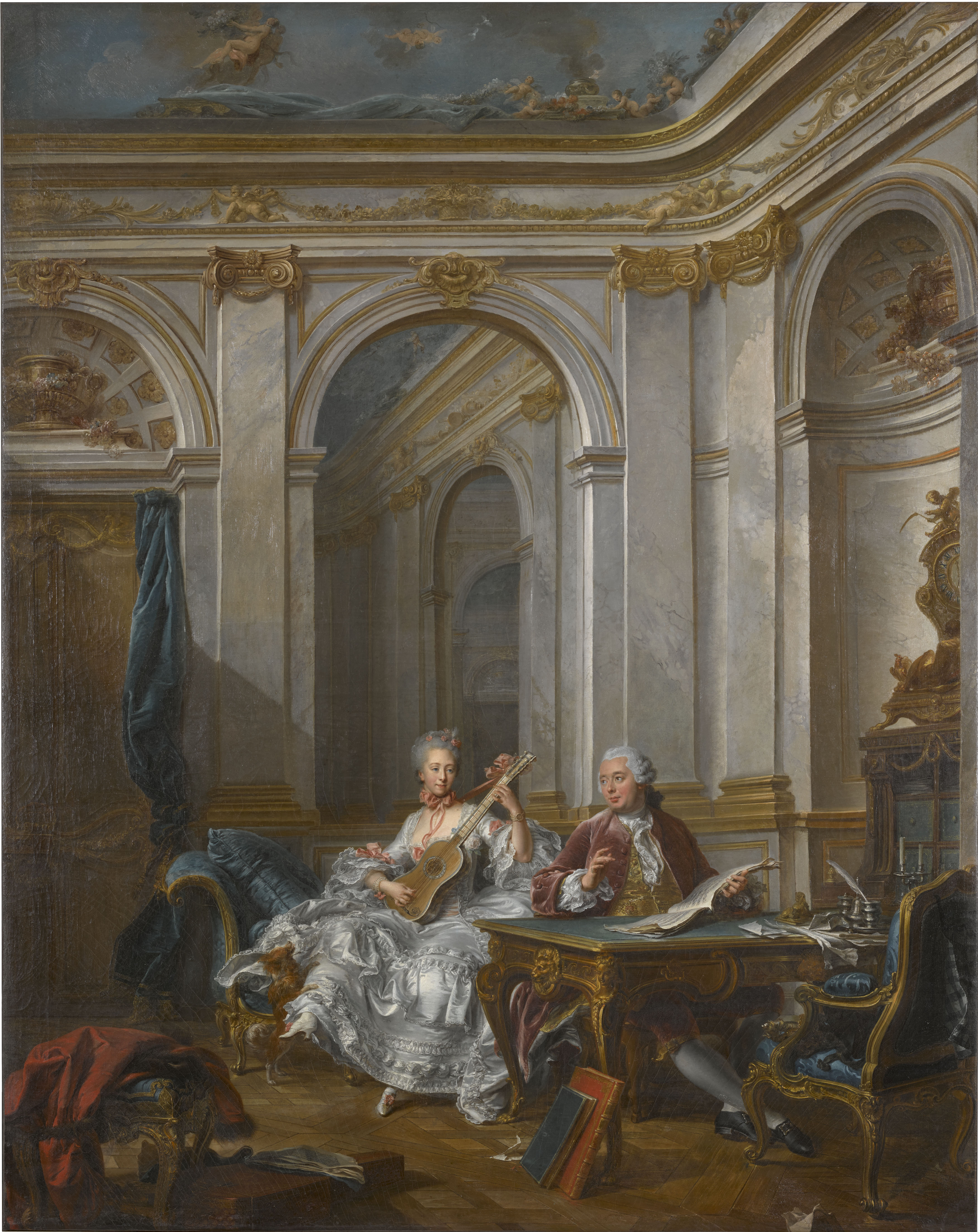 Après restauration